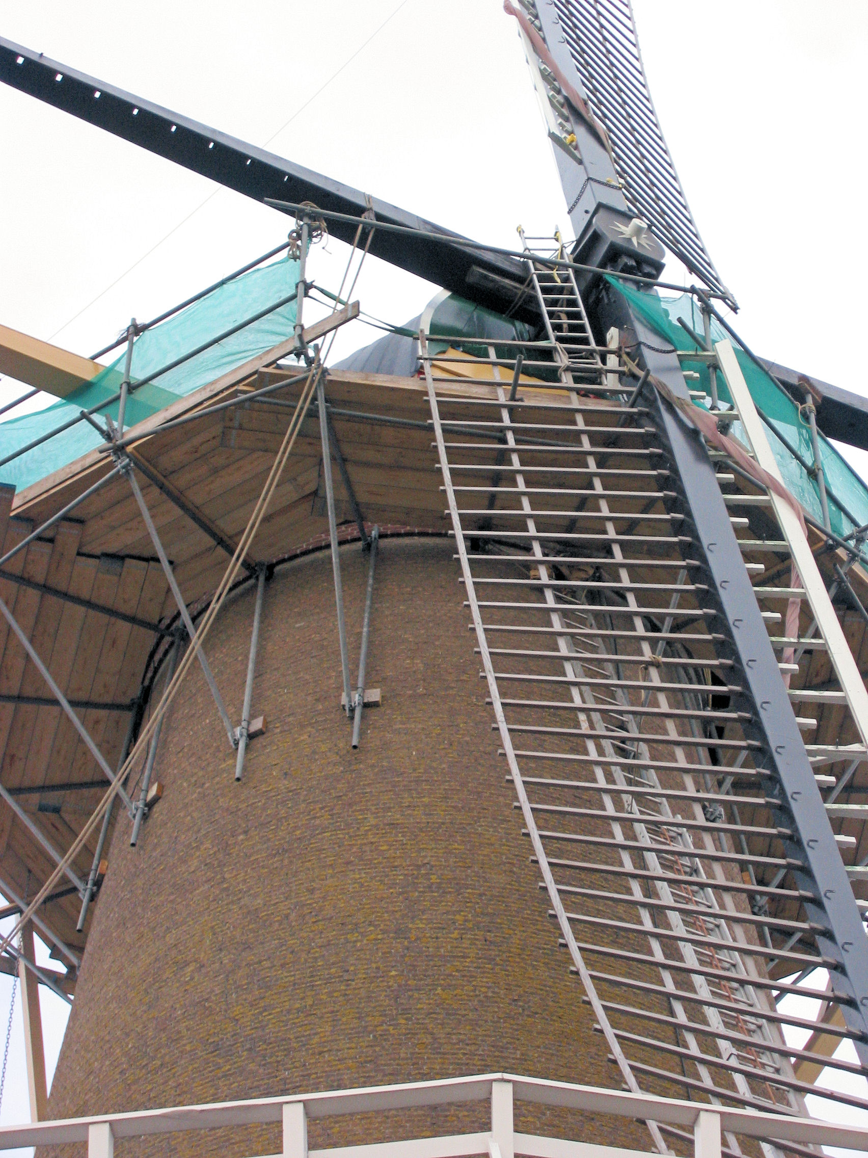 De Distilleerketel in Delfshaven, Zuid-Holland, the Netherlands